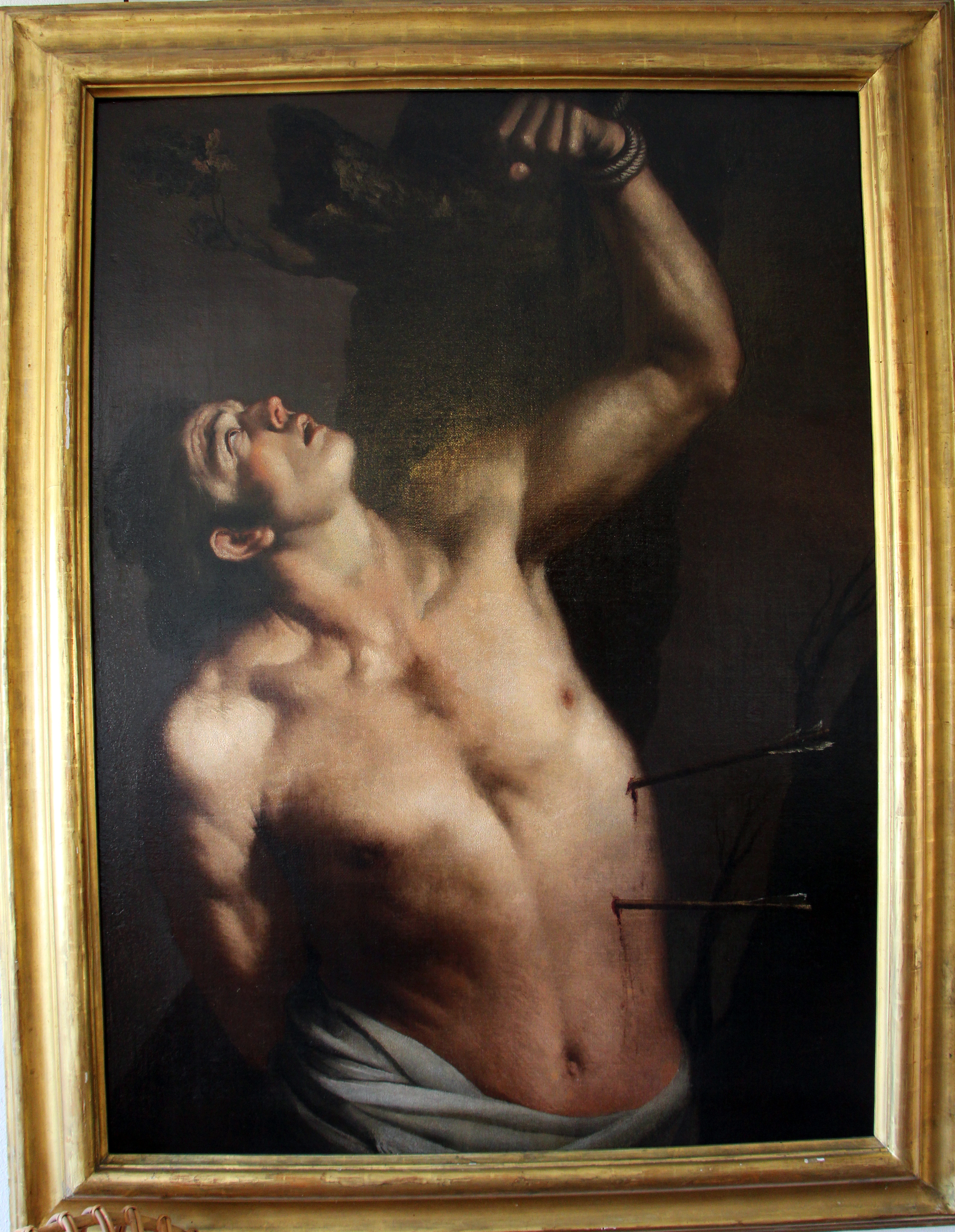 Palazzo Rosso - Musei di Strada Nuova The making of this document was supported by Wikimedia CH. (Submit your project!) For all the files concerned, please see the category Supported by Wikimedia CH. This is a photo of a monument which is part of cultural heritage of Italy.